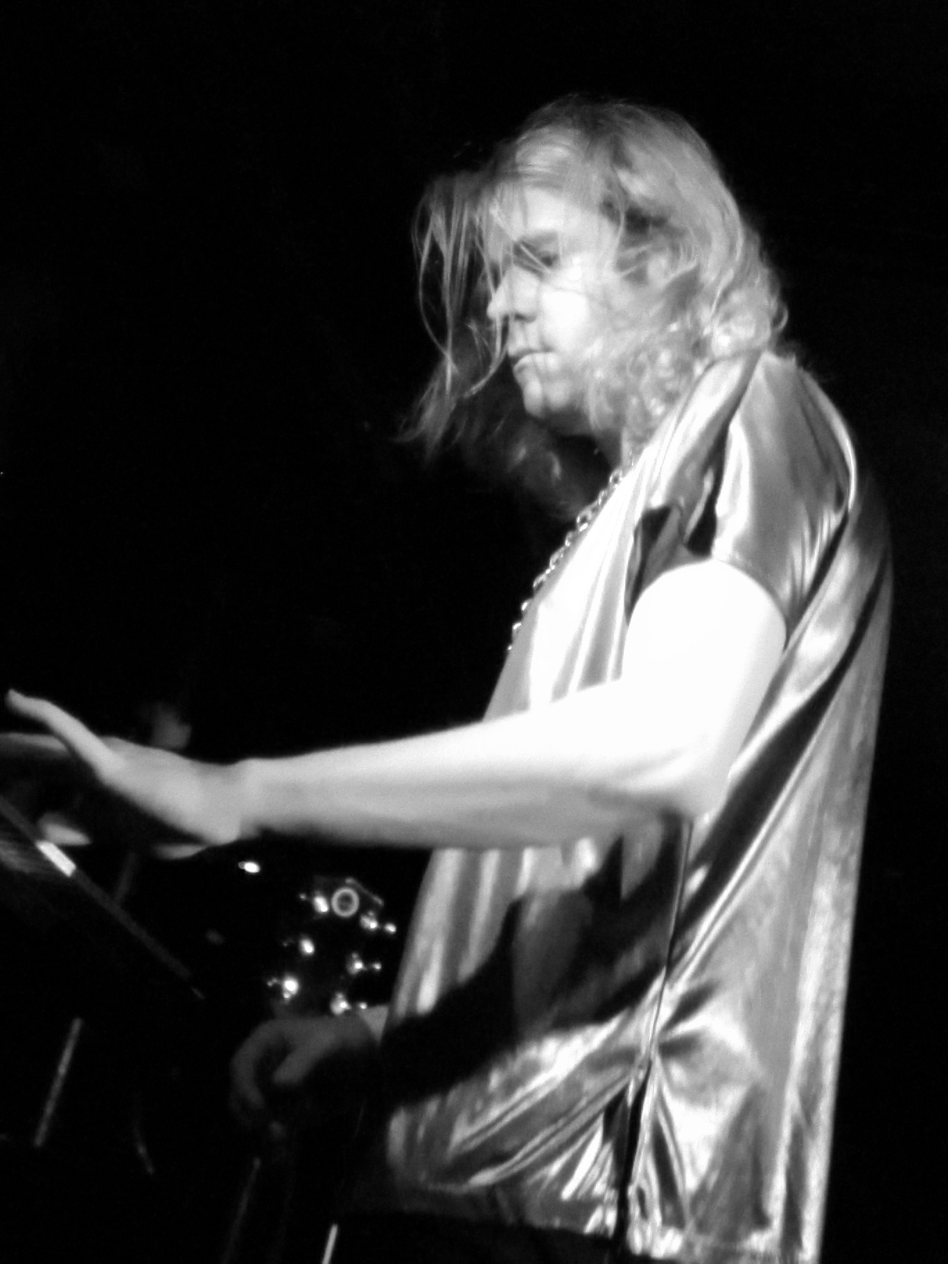 Ariel Pink / Ariel Pink's Haunted Graffiti